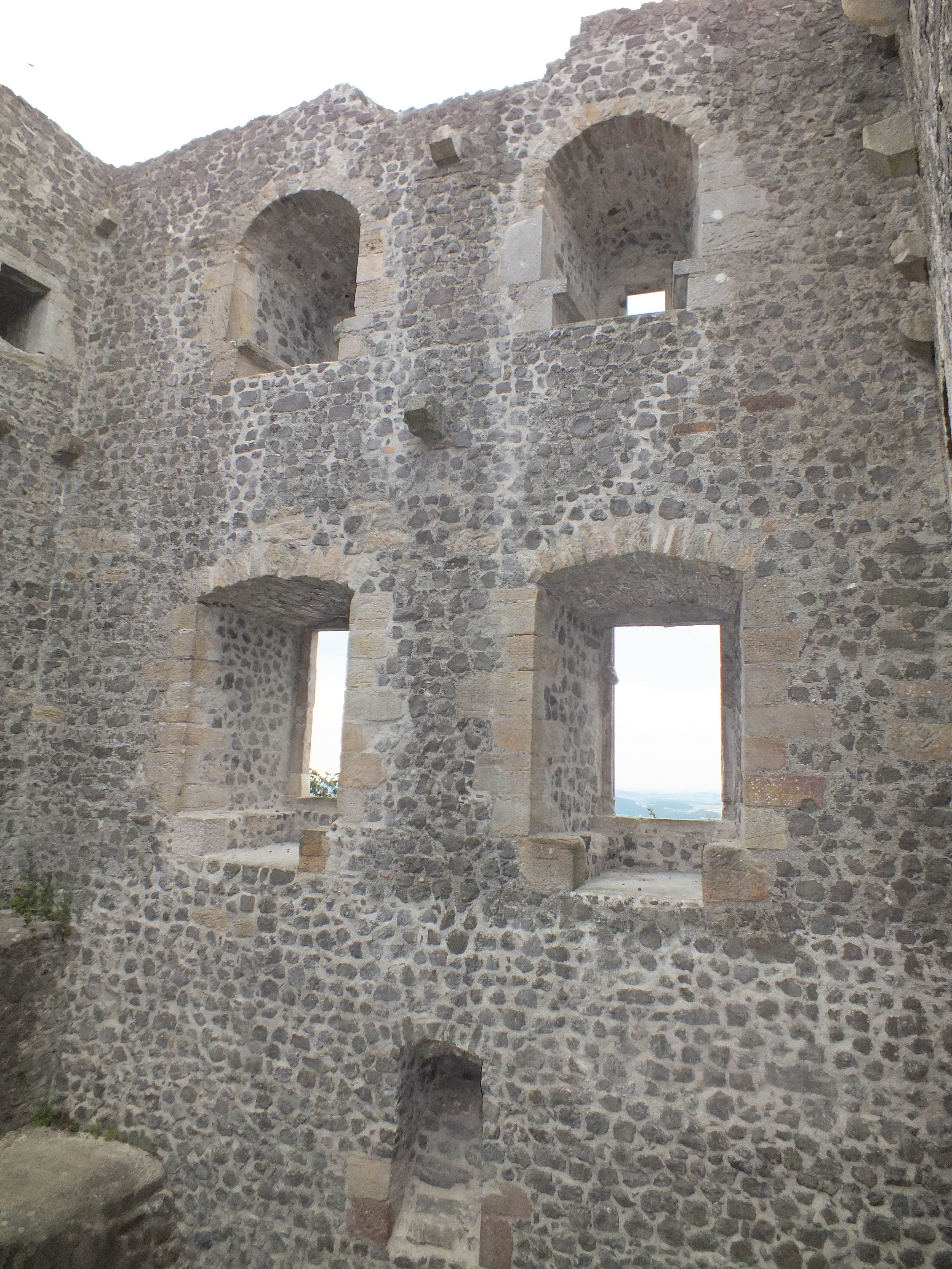 Restaurierte Turmreste an der Weidelsburg